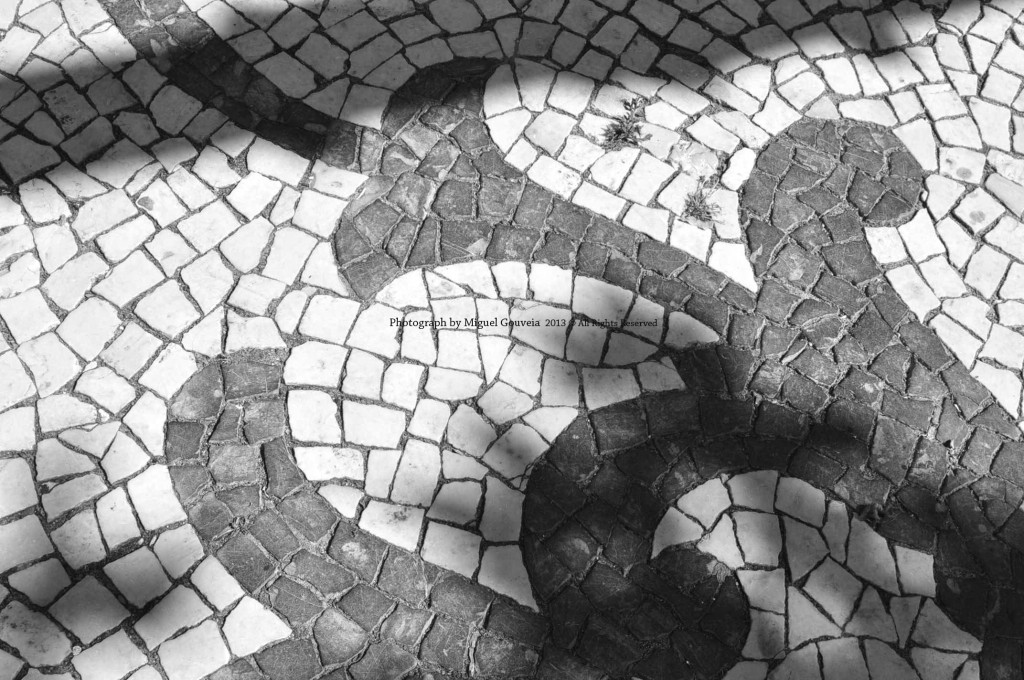 calçada portuguesa artistica